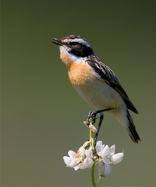 Saxicola rubetra - male, Libavá, CZ